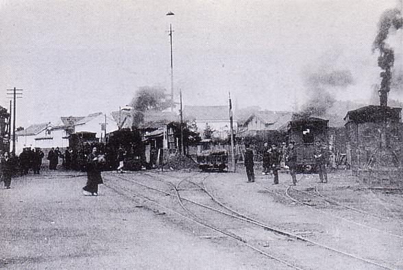 Amagi station (Asakura Tramway)